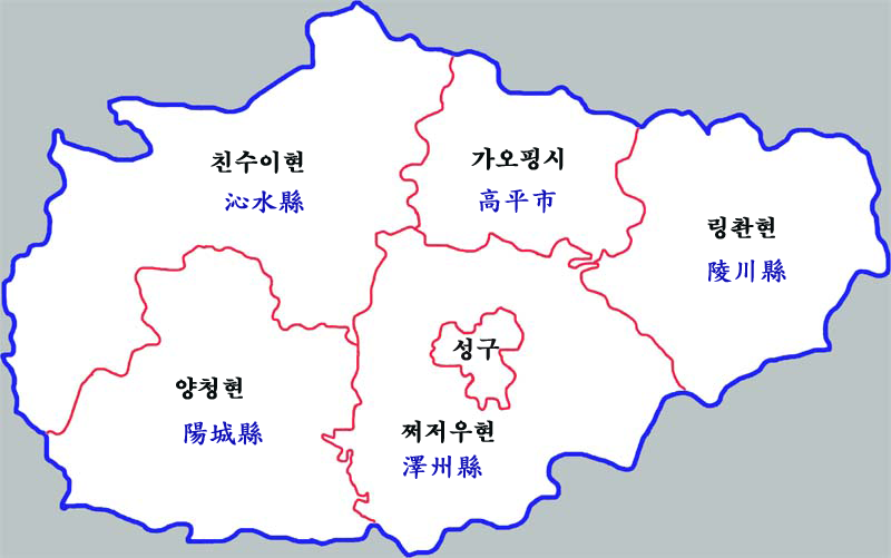 진청시 현급구역도